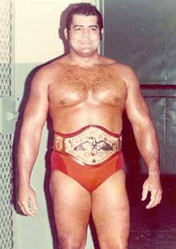 Pedro Morales WWWF